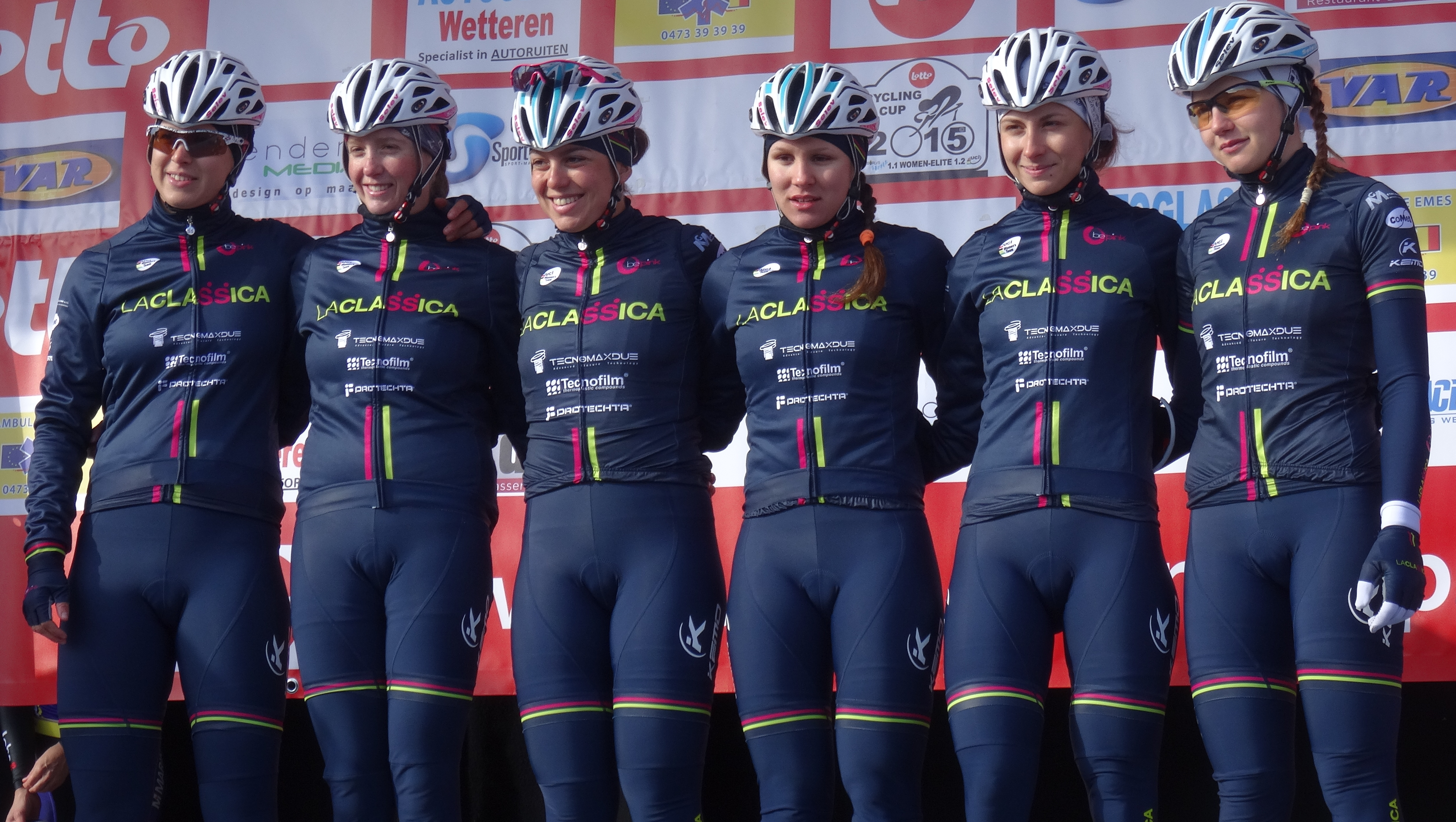 Reportage réalisé le mercredi 4 mars à l'occasion du départ du Samyn des Dames 2015 et du Samyn 2015 à Quaregnon, Belgique.